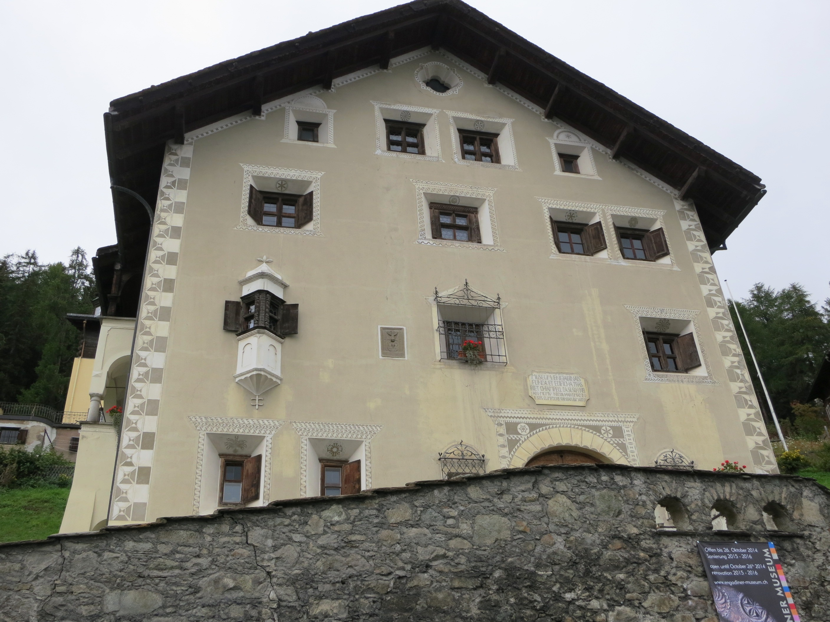 Engadinermuseum, St. Moritz GR, Schweiz: Erker, Wappentafel und Korridorgitter des ersten Stockes stammen vom abgerissenen Salis-Haus Turtach aus Celerina